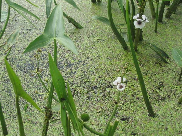 Pijlkruid